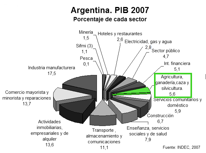 Argentina. Estructura del PBI(GDP structure)- 2007. Graphic. Destacado el sector agrario, ganadero, caza y silvicultura.